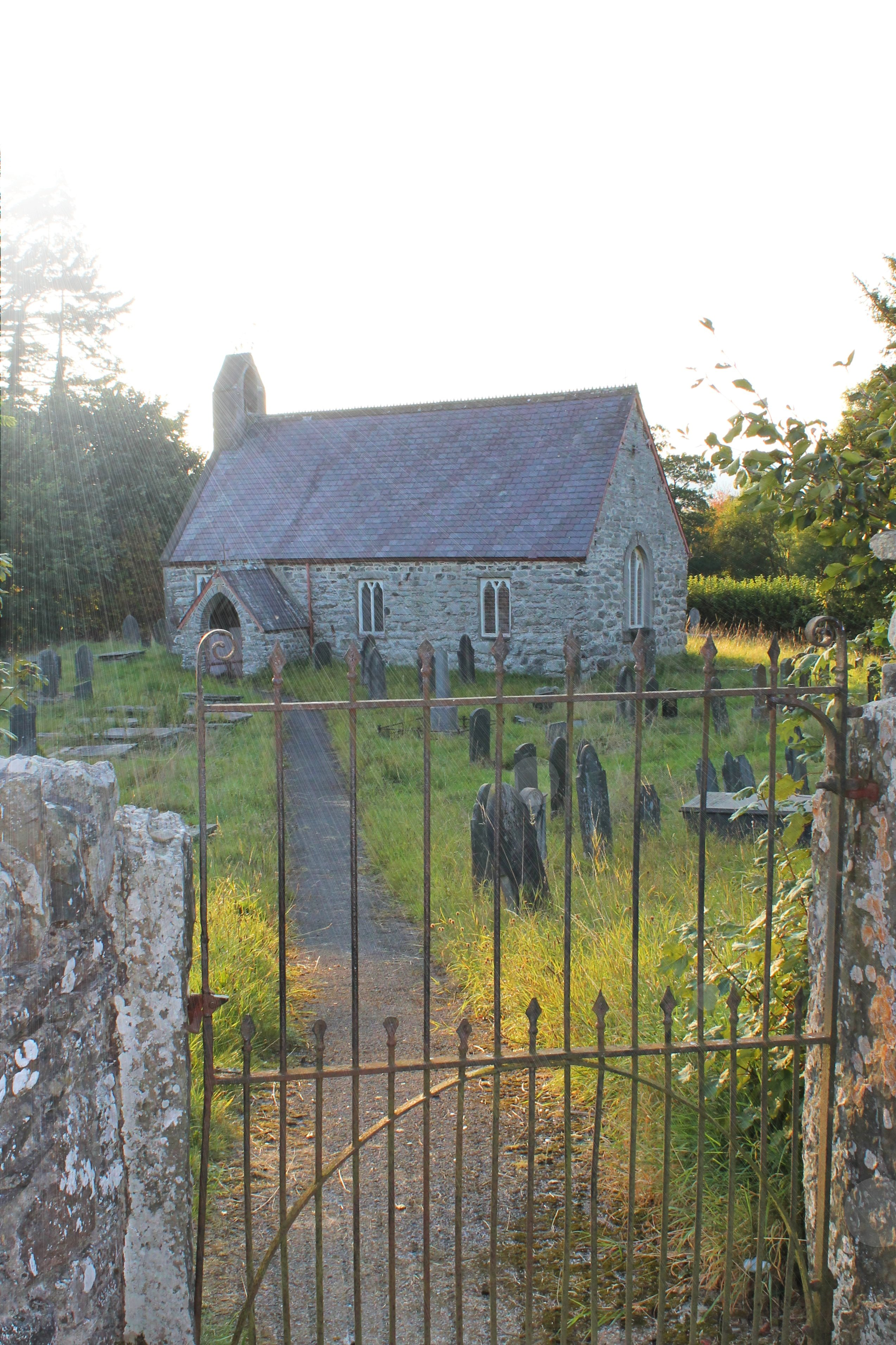 Eglwys Santes Cywair, Llangywer, Gwynedd.